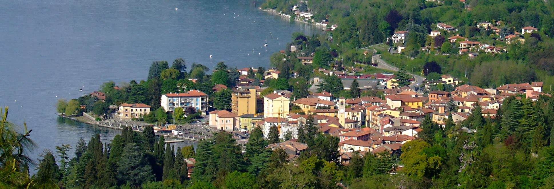 View of Porto Valtravaglia